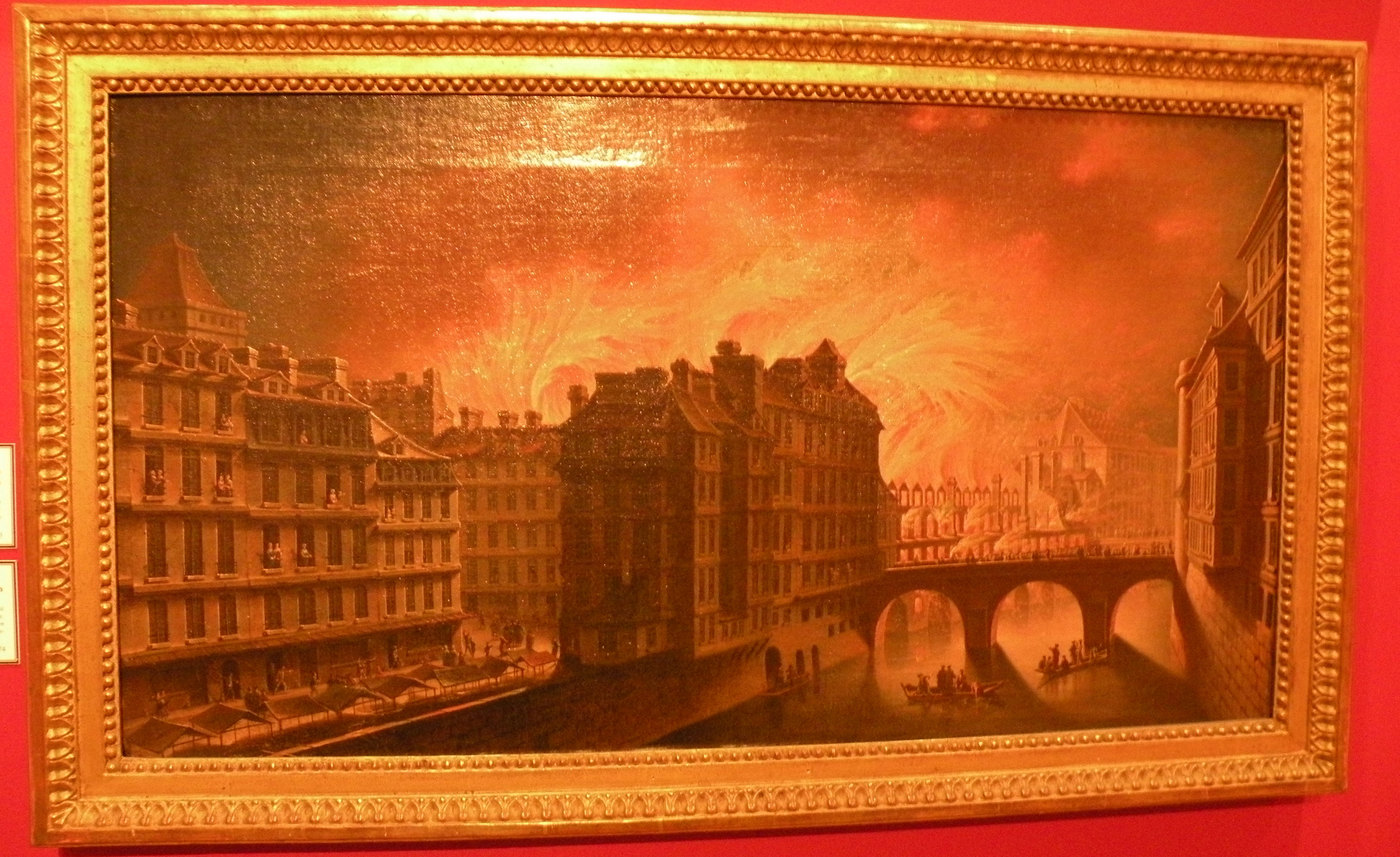 Carnavalet - L'incendie de l'hotel dieu en 1772 vu du pont st michel - Raguenet